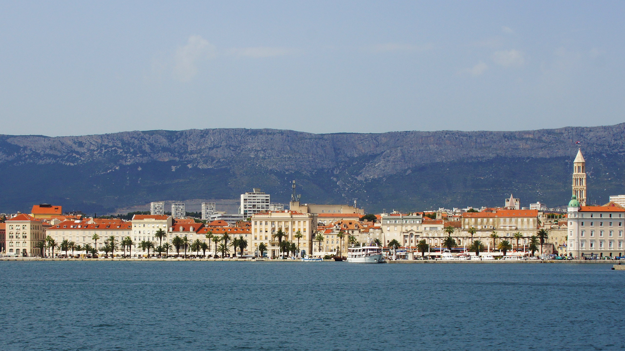 Split: das Zentrum und Altstadt am Hafen - Ansicht vom Wasser (seaside view) auf die Stadtpromenade Riva Obala Hrvatskog narodnog preporoda (Stadtansicht vom Platz Trg Franje Tuđmana links bis zum Turm der Kathedrale von Split Katedrala Sv. Dujma rechts), Dalmatien Kroatien Hrvatska - Foto Wolfgang Pehlemann DSC06476